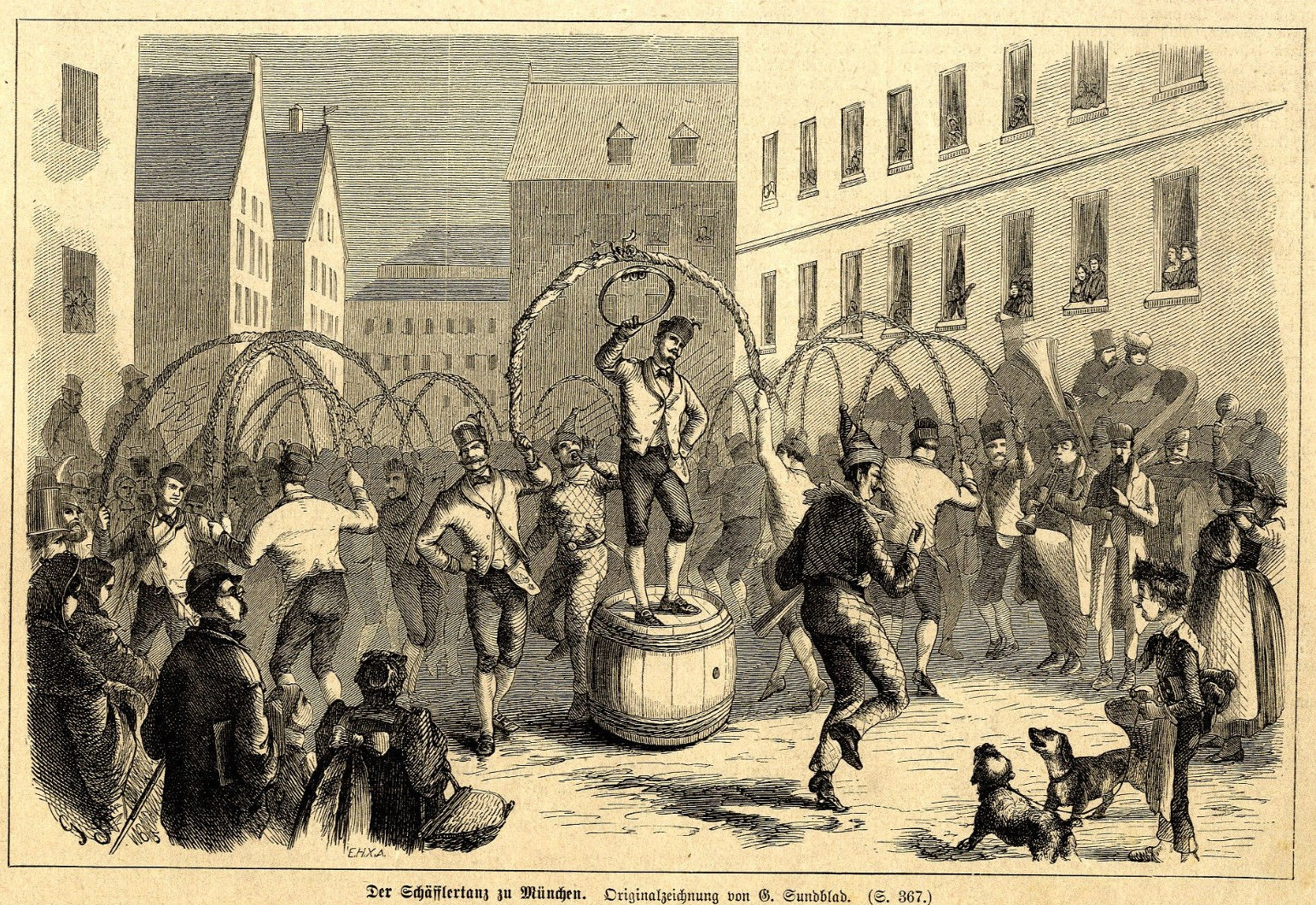 Der Schäfflertanz zu München, 1886